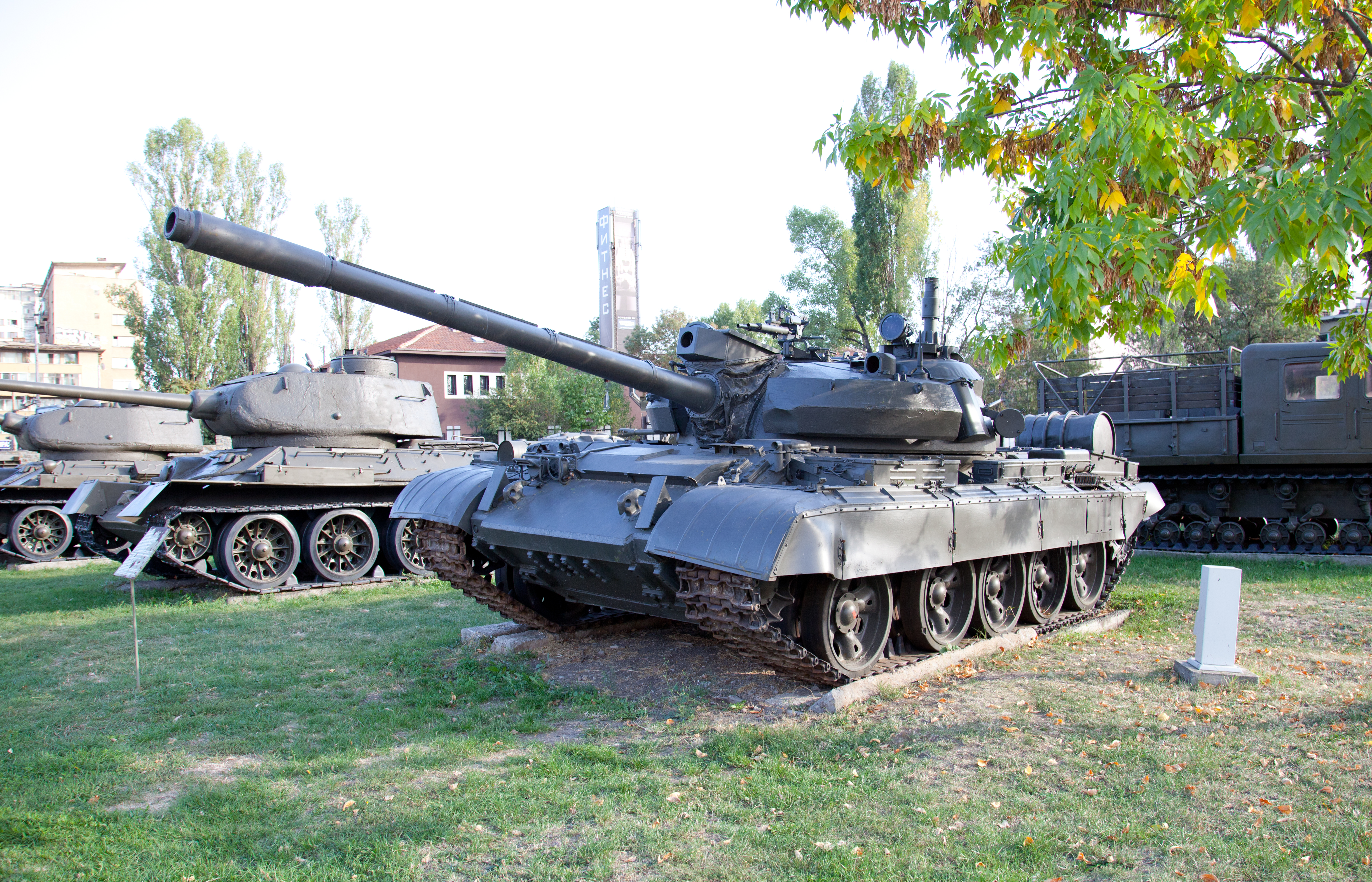 Sofia; der "Frauenmarkt" (Schenski pasar)